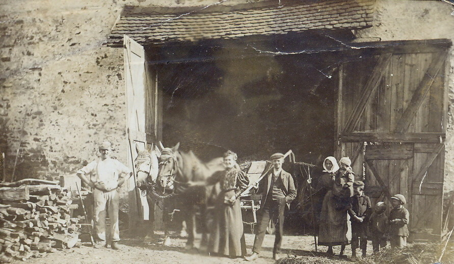 Herrnmuehle bei Kransberg (~1907)